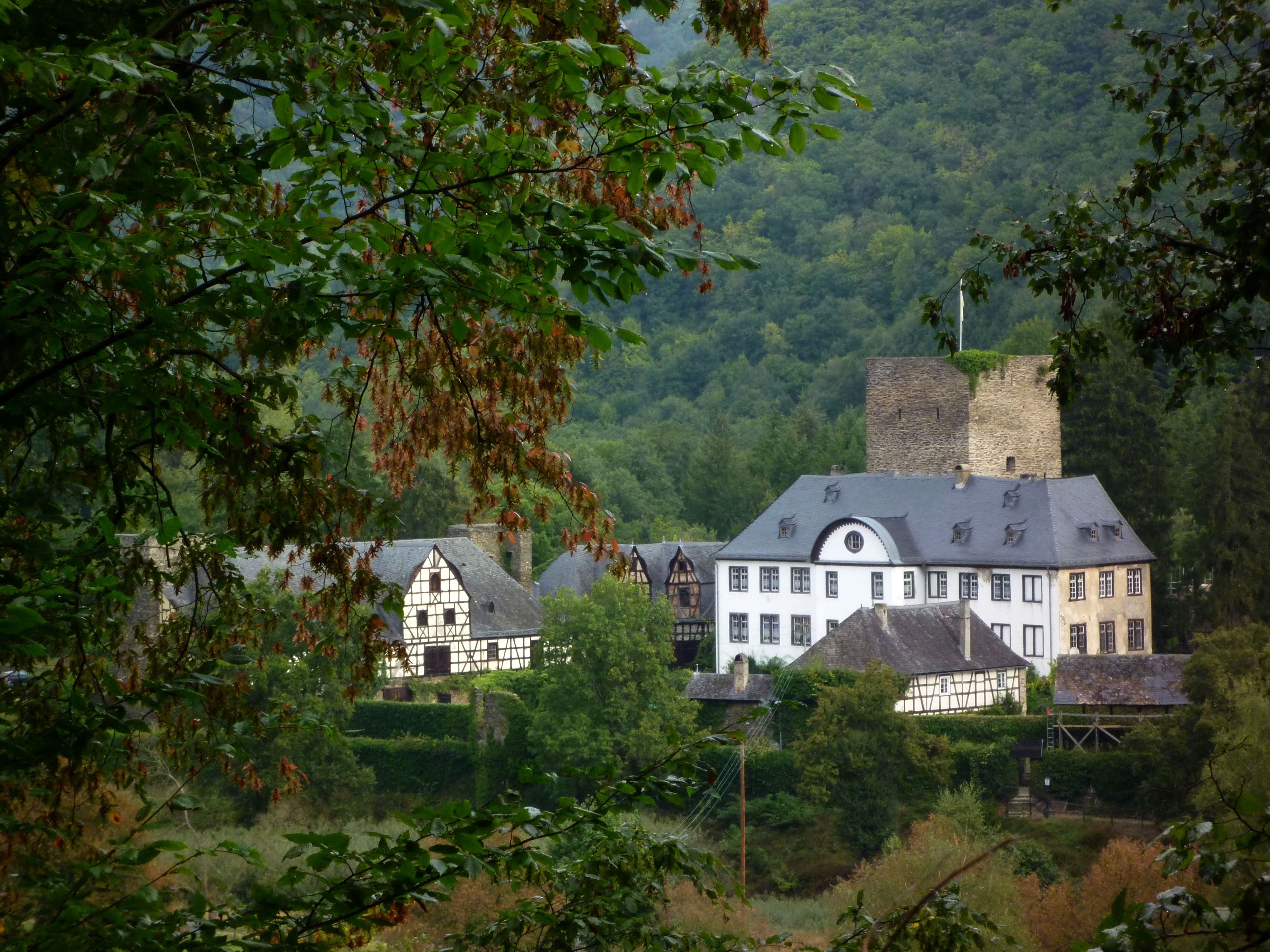 Arnstein - Burg Arnstein.jpg